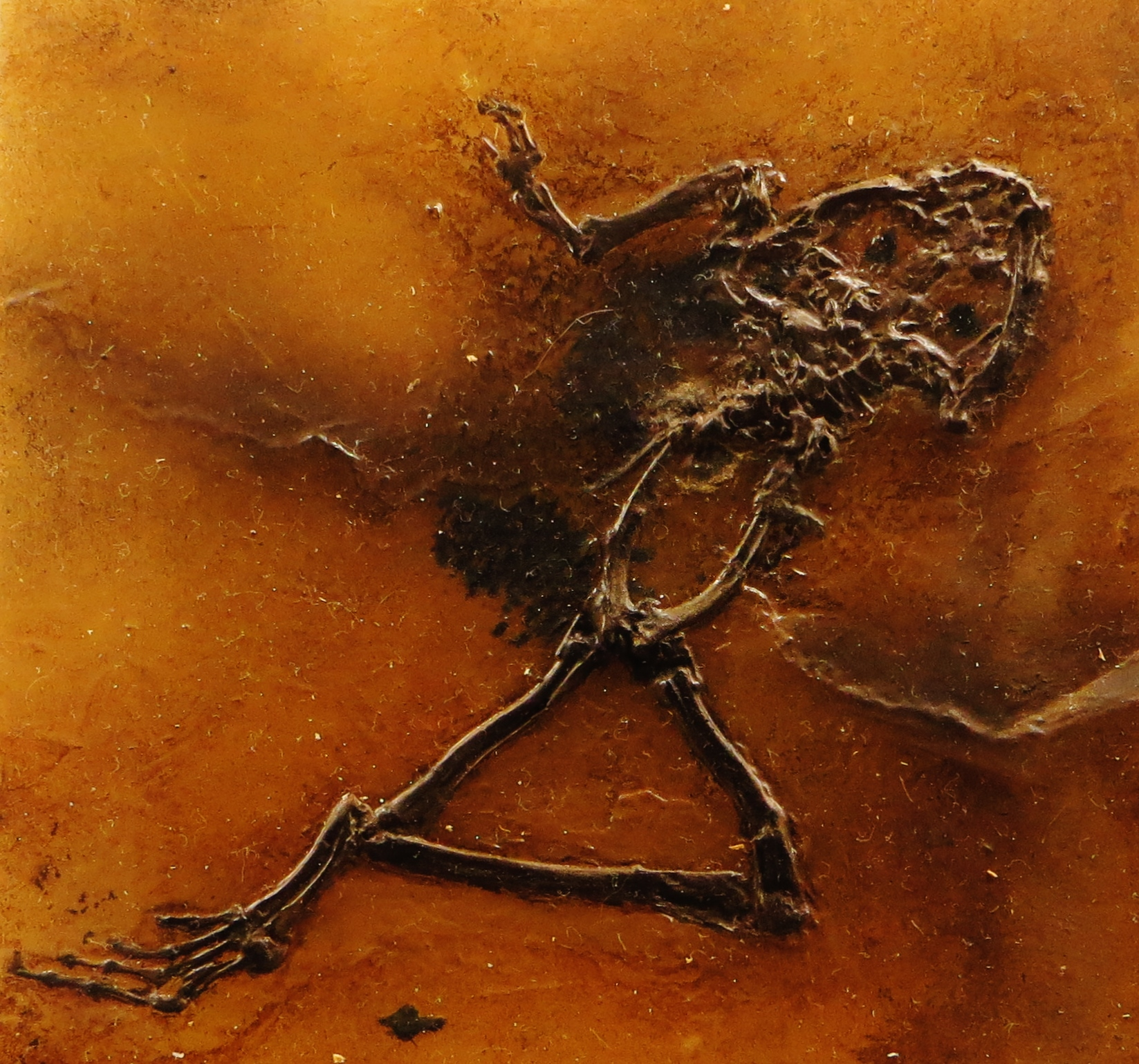 Fossil of Eopelobates, an extinct amphibian- Took the picture at Museum of Paleontology, Tuebingen